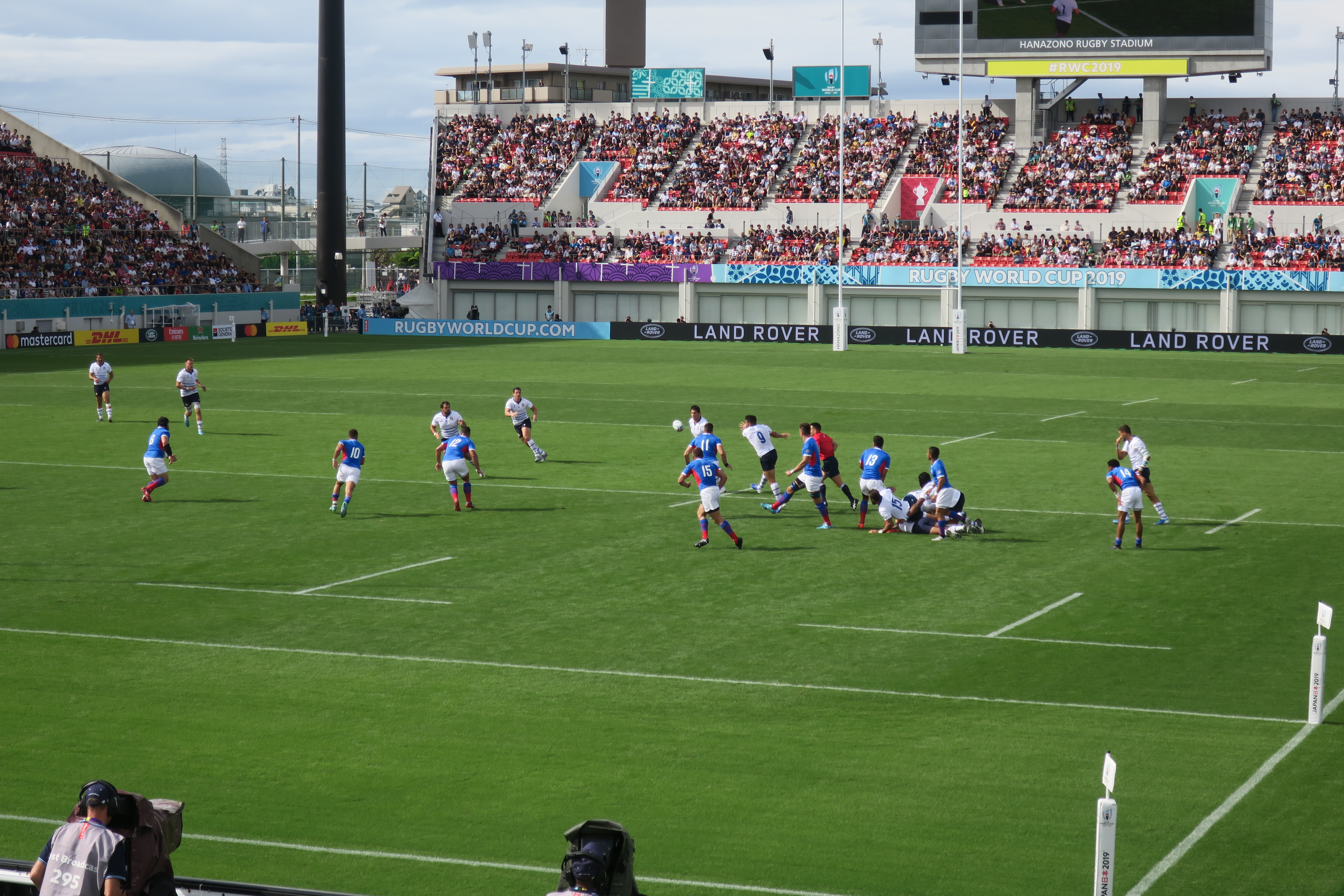 2019 ラグビーワールドカップ イタリア対ナミビア（2019年9月22日、東大阪市花園ラグビー場）